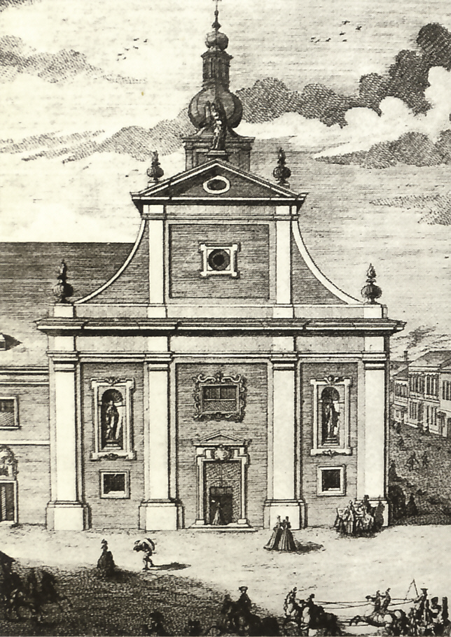 Paulanerkirche (1721), Stich von Salomon Kleiner (nach einem Kupferstich aus der kleinen Pfeffel'schen Topographie um 1730)